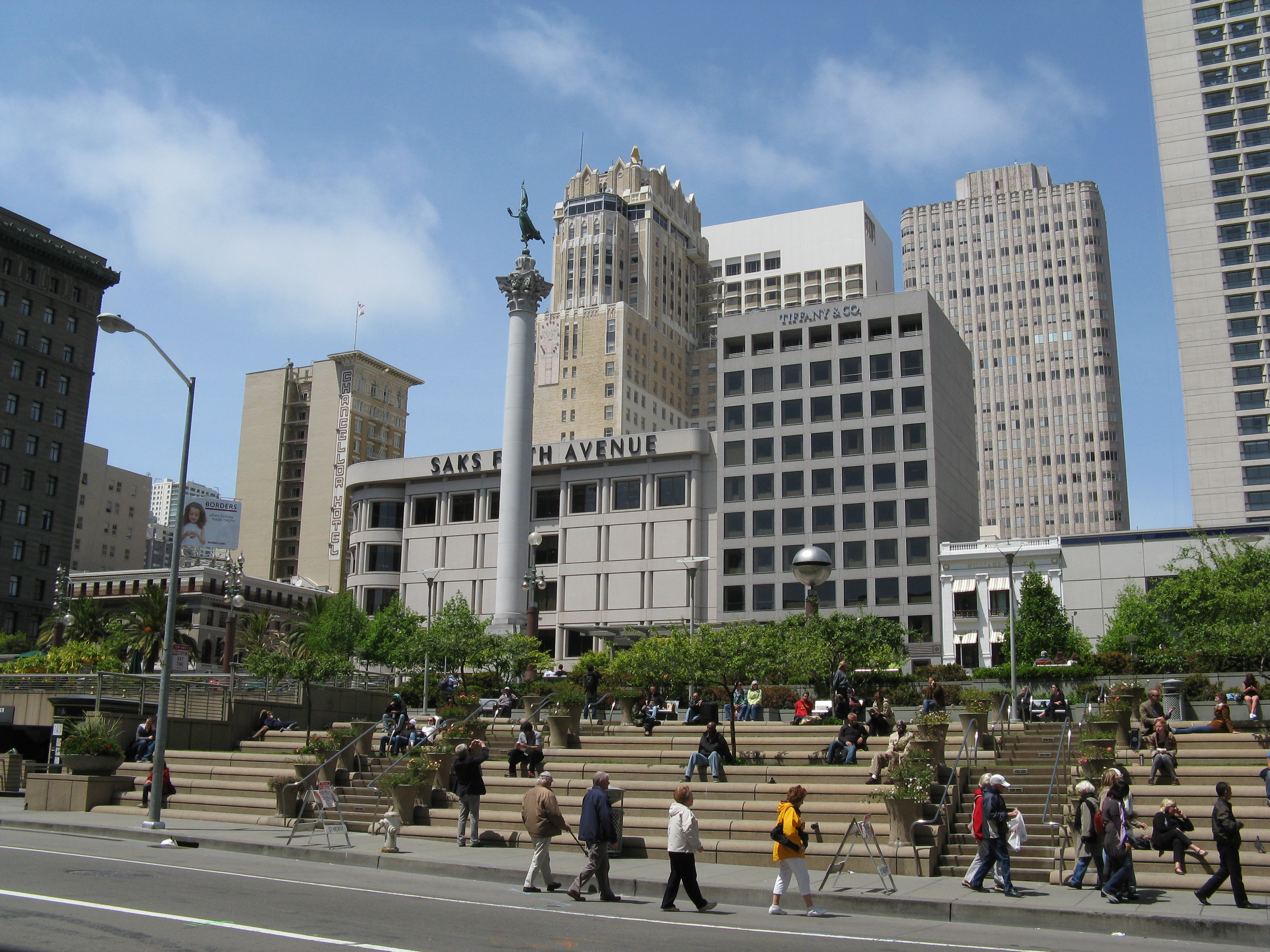 Union Square, San Francisco